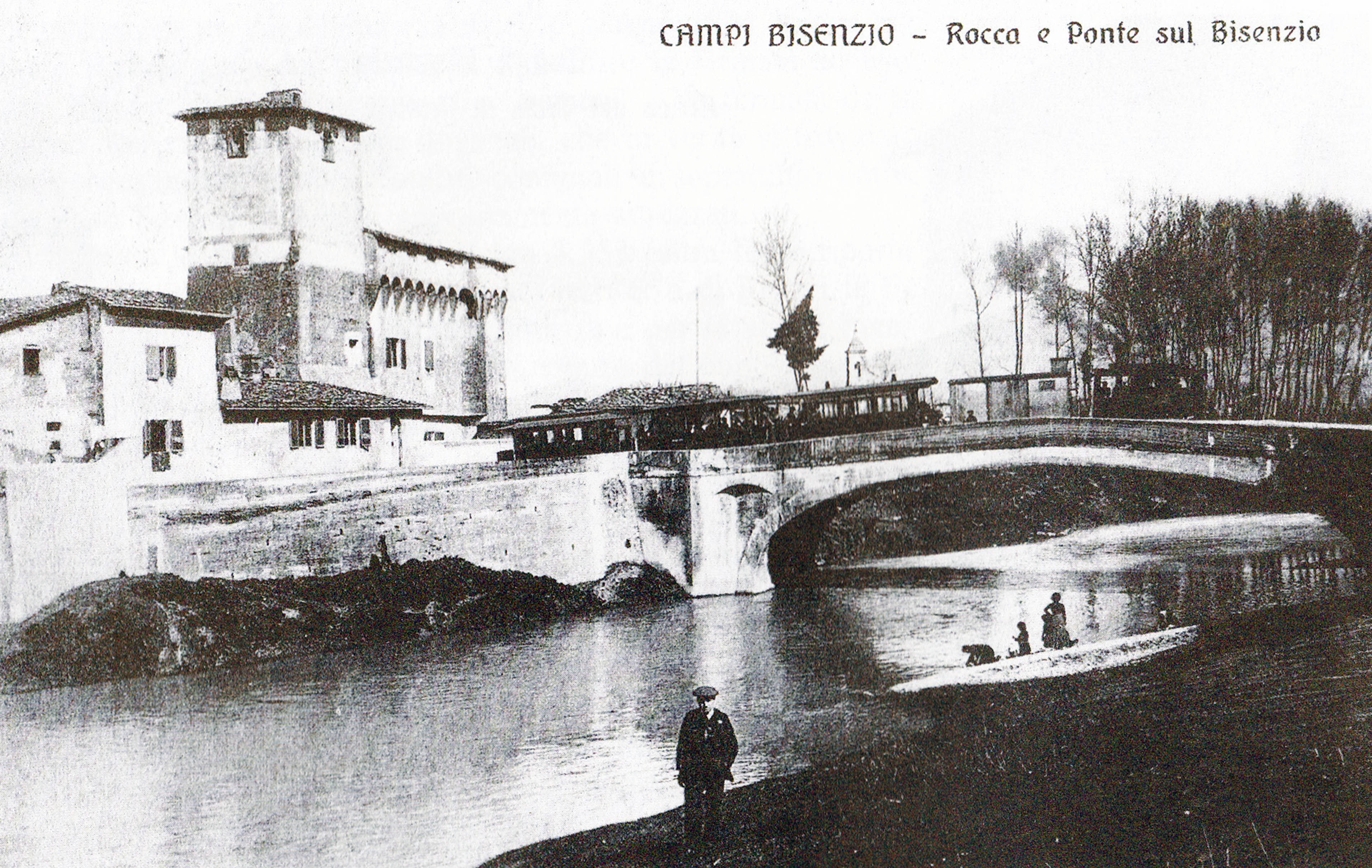 La Rocca e il ponte sul Bisenzio a Campi Bisenzio. Nella cartolina è visibile il convoglio tranviario diretto a Prato.